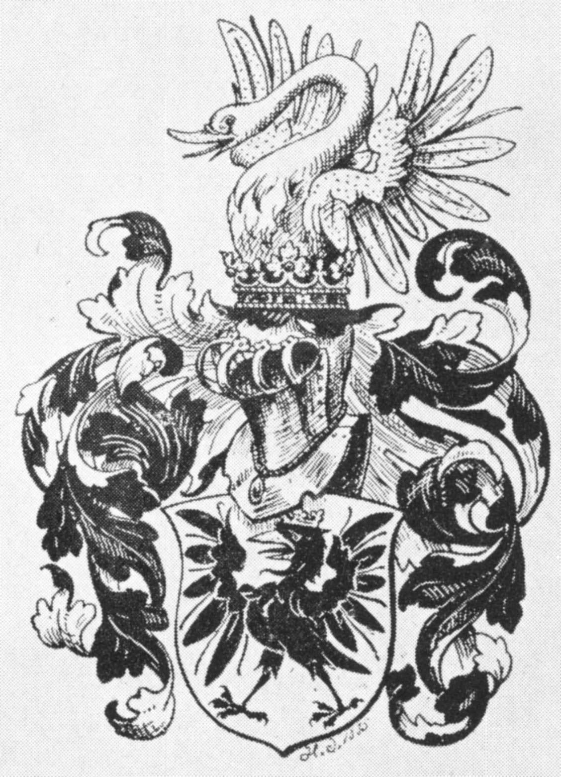 Wappen der Freiherren von Mentzingen nach v.d. Becke-Klüchtzner (1886)